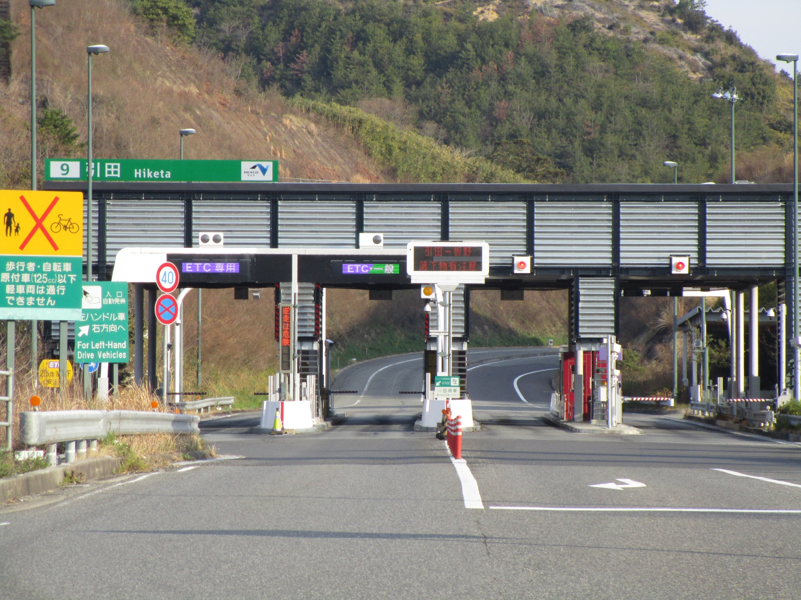 引田インターチェンジ料金所